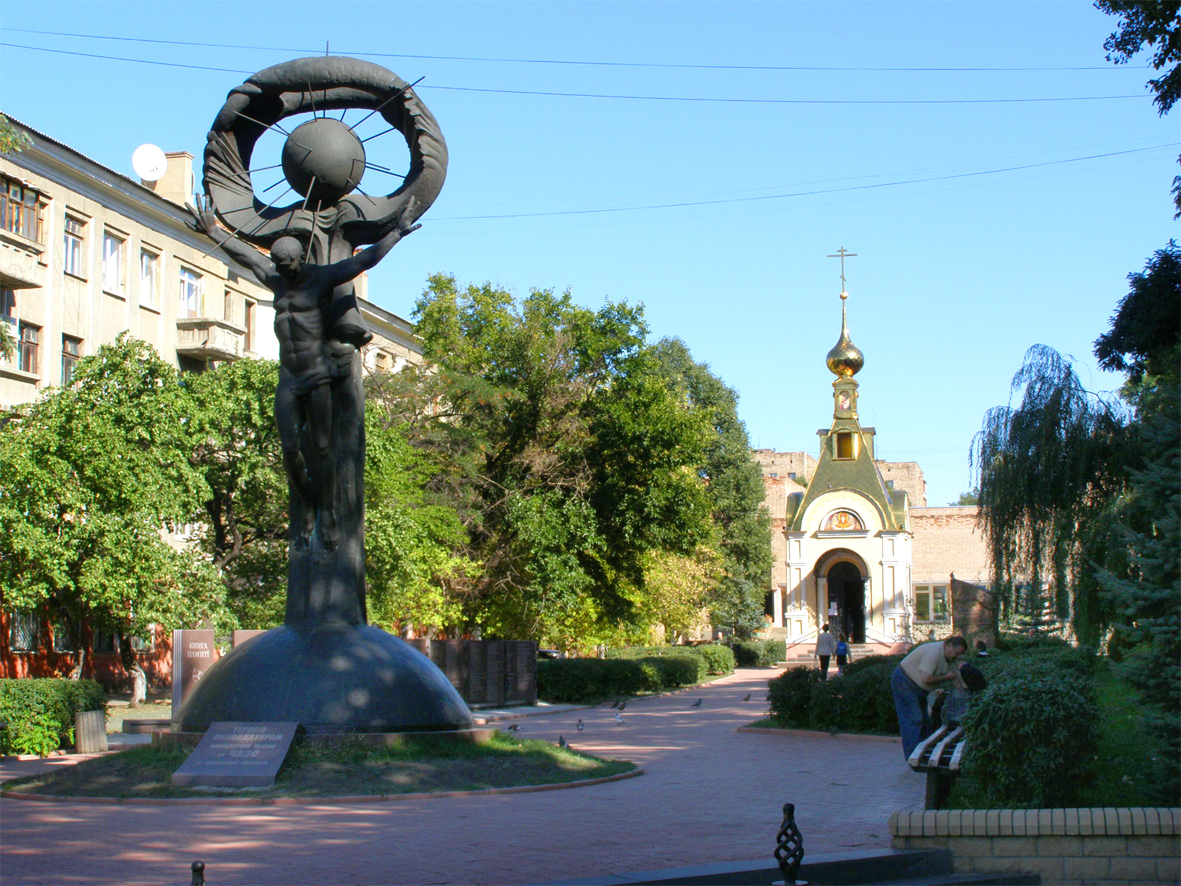 Пам'ятник чорнобильцям. Луганськ